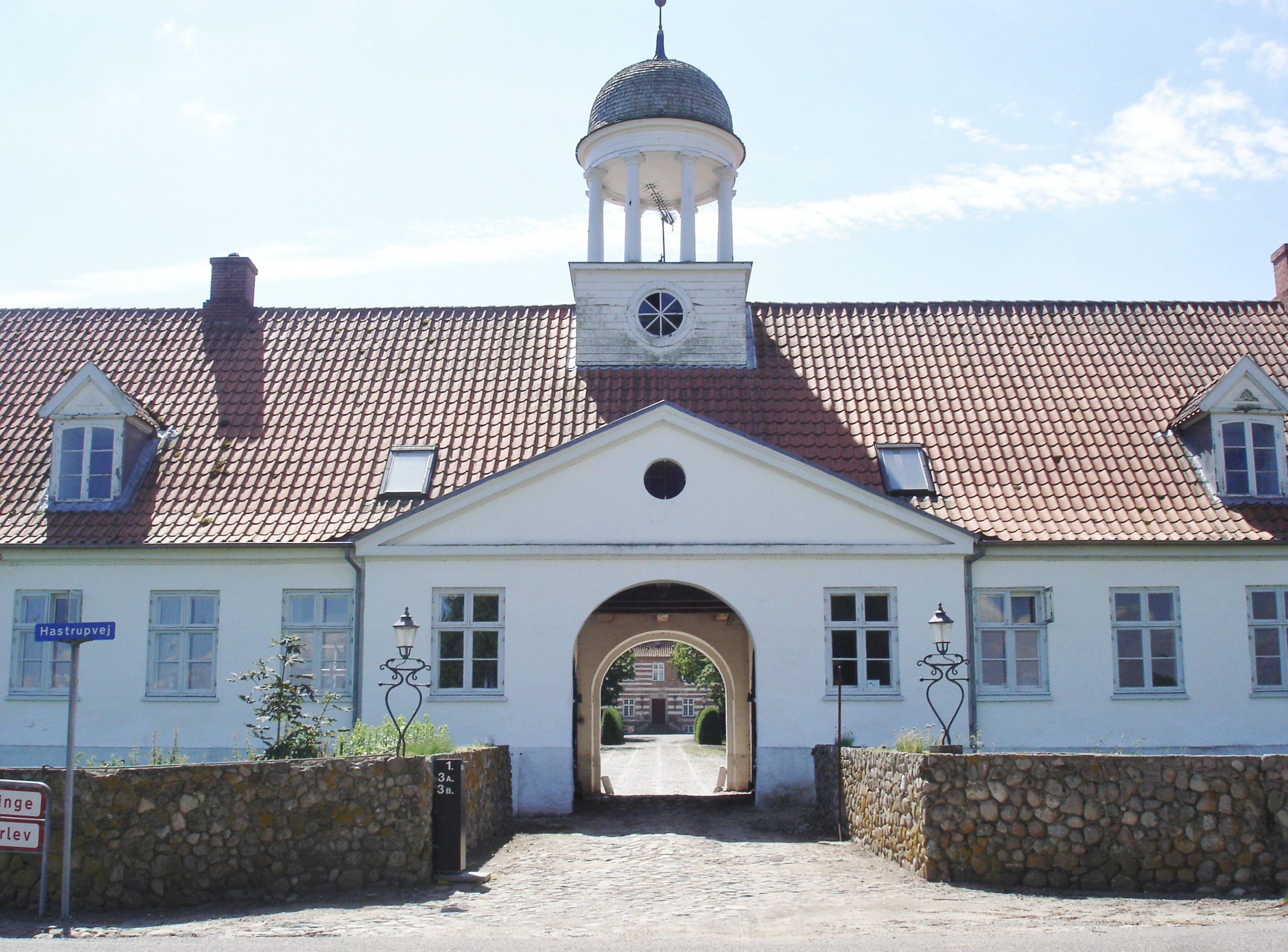 Godset Beldringes porthus